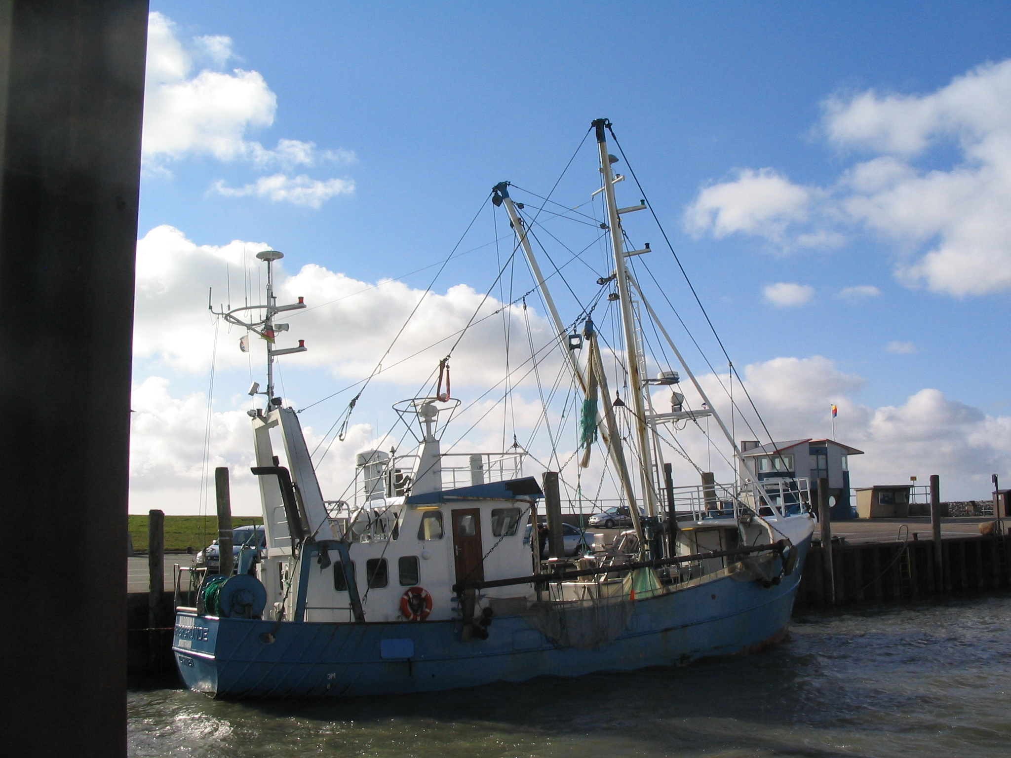 Strucklahnungshörn, Nordstrand